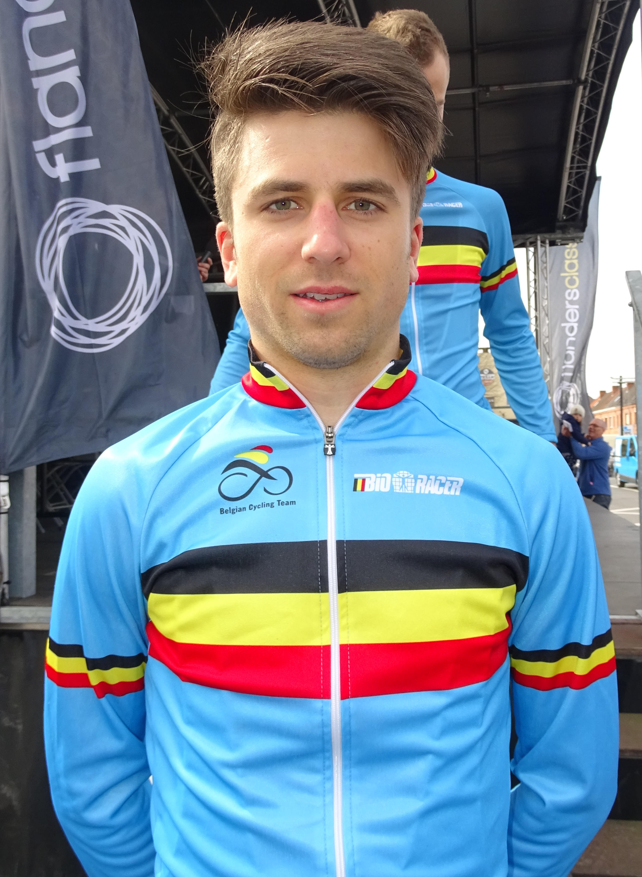 Reportage réalisé le samedi 9 avril à l'occasion du départ et de l'arrivée du Tour des Flandres espoirs 2016 à Audenarde, Belgique.